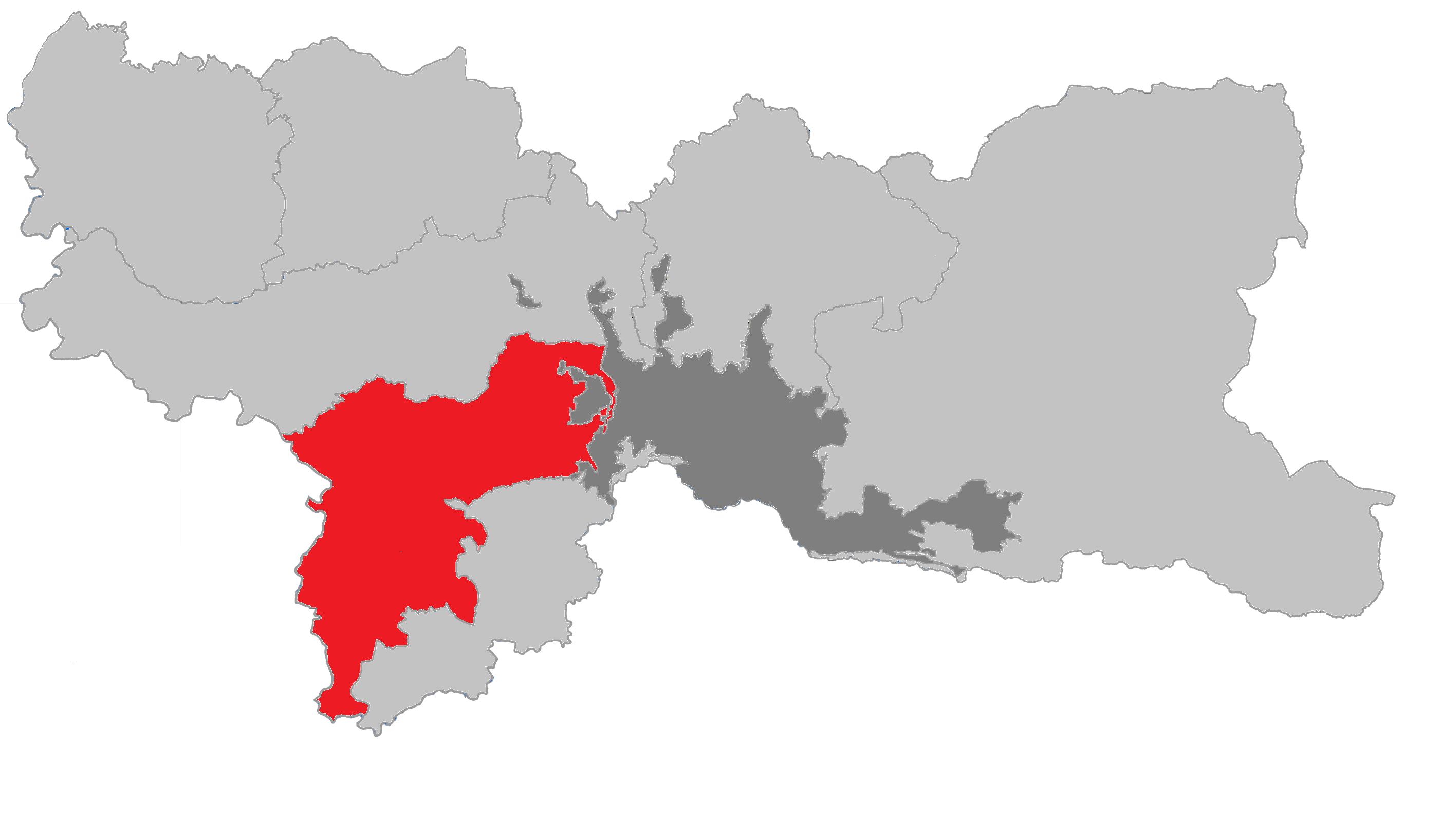 corregimiento panorama de manizales